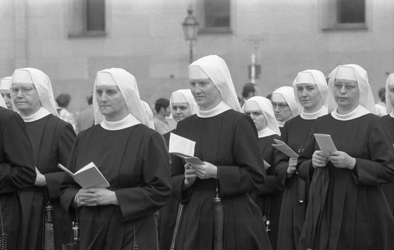 München Fronleichnamsprozession auf der Ludwigstrasse